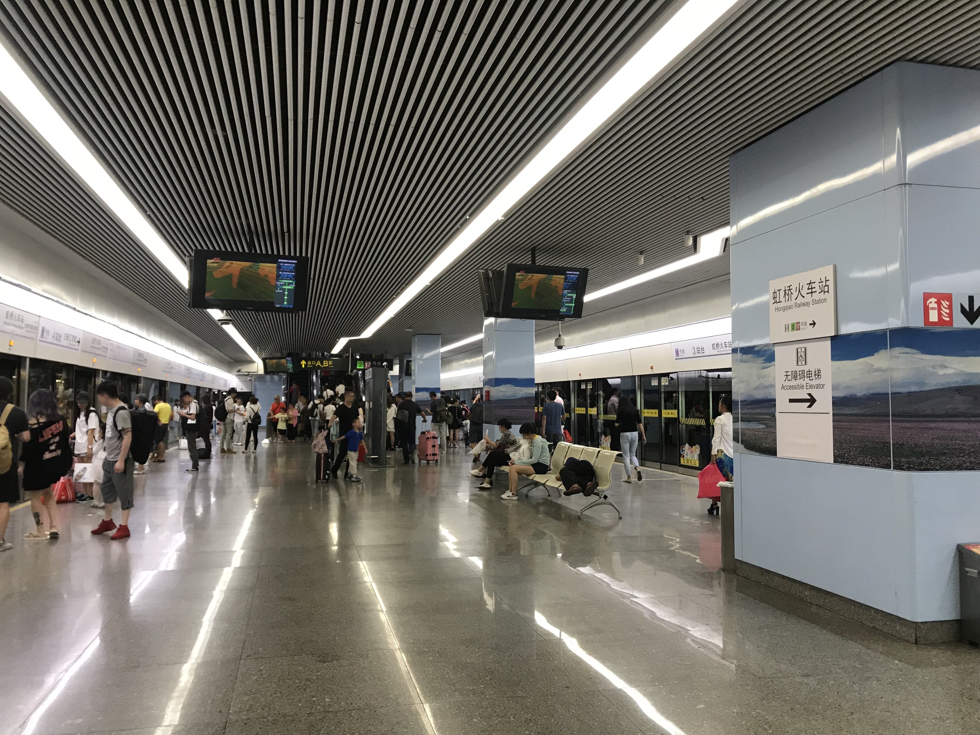 虹橋駅駅(上海地下鉄10号線)のホーム